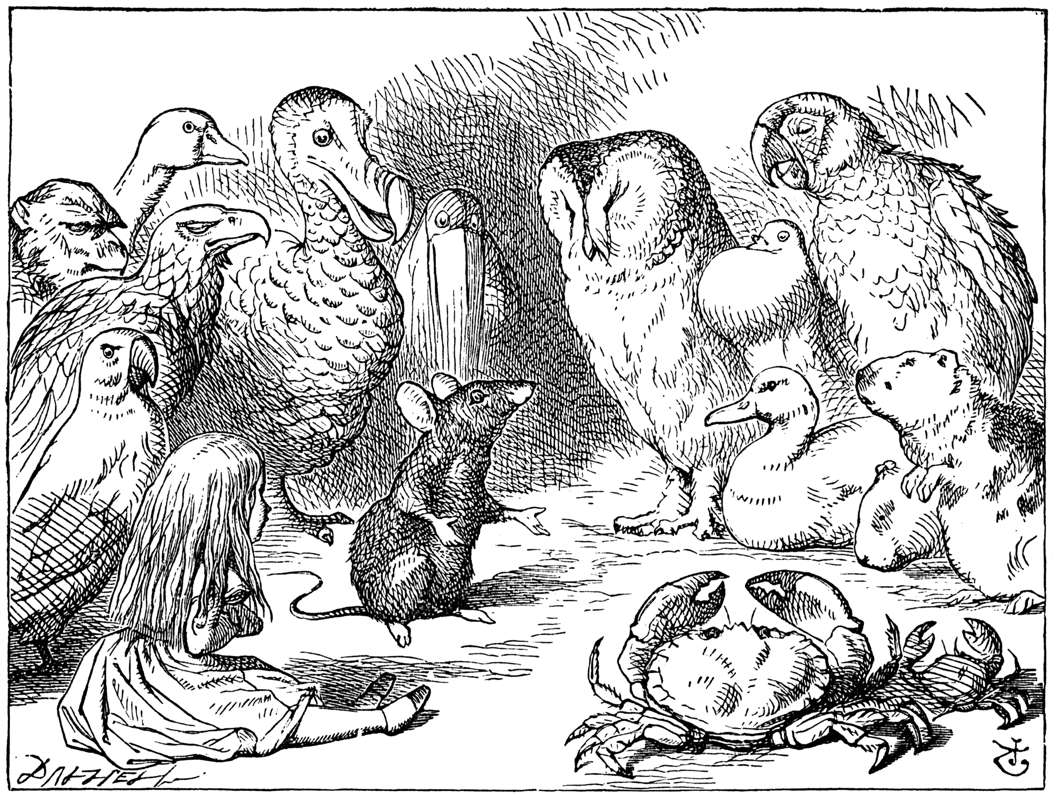 Illustration d'origine (1865), par John Tenniel (28 février 1820 – 25 février 1914), du roman de Lewis Carroll, Alice au pays des merveilles.